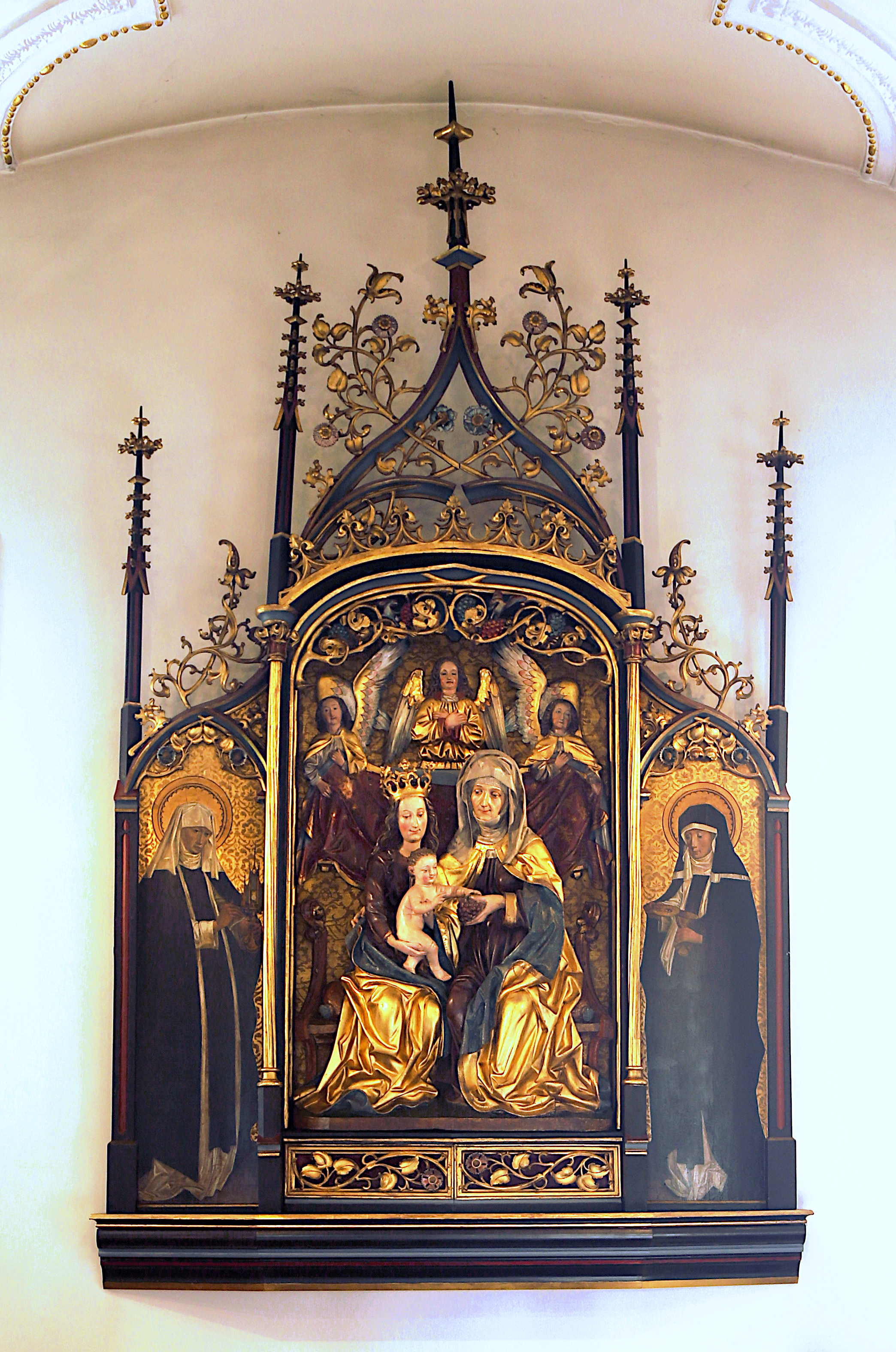 St. Ignatius Kapelle in der Marienanstalt Warnberg. Der Bau ist späte Renaissance im Übergang zum Barock. Die Figurengruppe des Altarbilds ist eine Anna Selbdritt von Erasmus Grasser in einer neugotischen Fassung. An den Wänden drei gotische Flachreliefs aus dem Leben Christi unbekannter Herkunft. Hier: Anna Selbdritt von Erasmus Grasser.